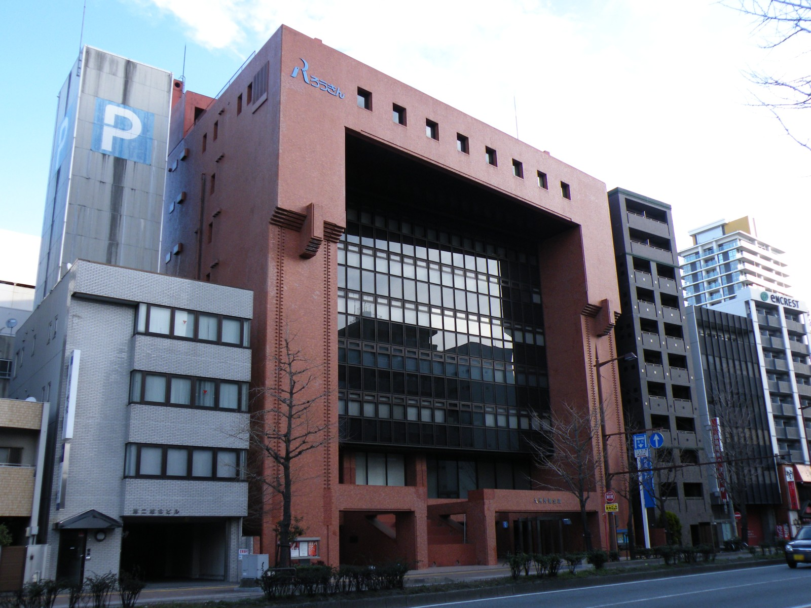 九州労働金庫（九州ろうきん）本店：福岡市中央区